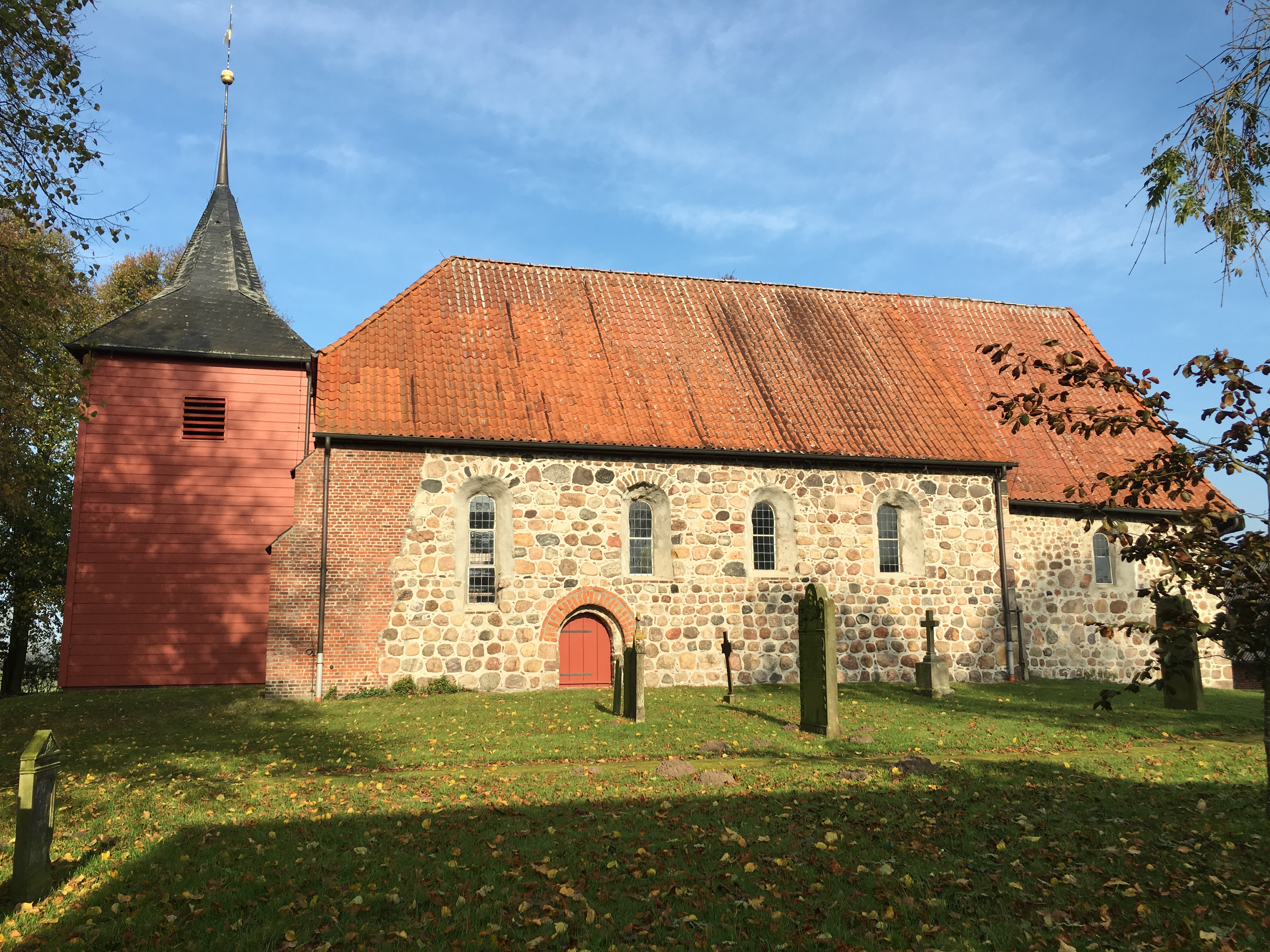 Kark op de Host bi Burweg